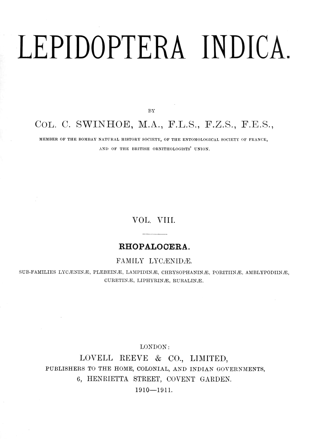 Dedication of Lepidoptera Indica Volume 8